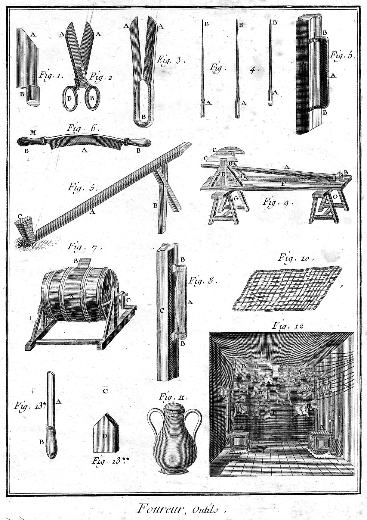 Handwerkszeug des Kürschners und Fell-Trockenraum. Aus "Encyclopédie, ou dictionaire raisonne des sciences, des arts et des métiers" von Denis Diderot und Jean de Rond d'Alembert, Paris 1762-1777. IV. FOURREUR EXPLICATION Outils. Fig.1. Couteau à habiller. A la lame. B le manche. 2. Gros ciseaux. AA les taillans. BB les anneaux. 3. Forces. AA les taillans. BB le ressort. 4. Carrelets. AAA les tètes. BBB les pointes. C le piquet. 5. Chevalet. A le chevalet. B la gambette. C le piquet. 6. Couteau à ècharner. A la lame. BB les Manches. 7. Dégraissoir. A le tonneau. B le couvercle. C la manivelle. DD les supports. 8. Fer de pelletier. A la lame. B les moufles. C le poteau. 9. Banc à tirer les peaux. A la perche. B la moufle. CC les pallissoirs. DD leurs supports. EE, &c. les arcboutans. F la table. GG les treteaux. 10. Claie. 11. Pot de cuivre destiné â faire chauffer les drogues. 12. Élévation perspective de l'étuve à sécher les peaux. AA le poêles. BB, &c. peaux étendues sur des cordes. 13*. Racloire. A la lame. B le manche. 13**. Paumelle.